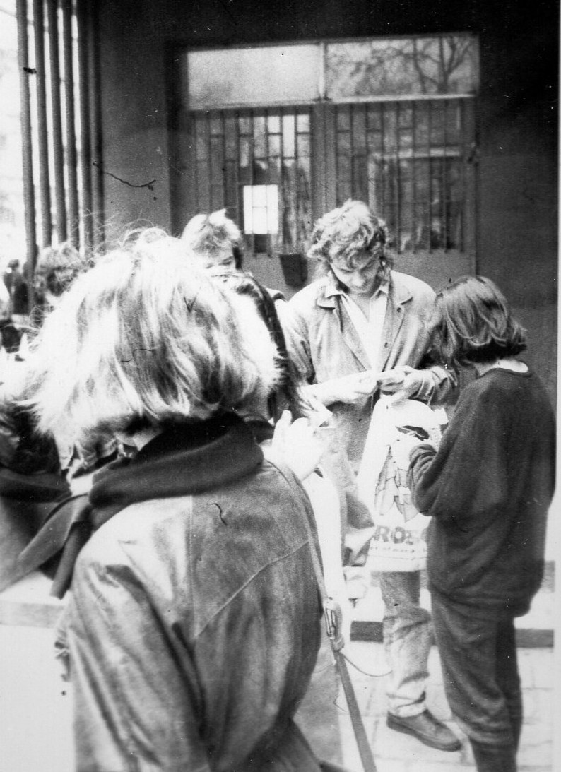 Codzienny gwar przed II LO, Poznań, III 1991r.